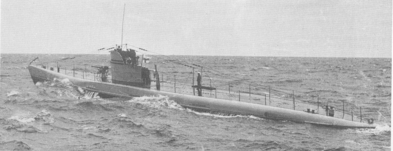 Finnish submarine Vesihiisi.